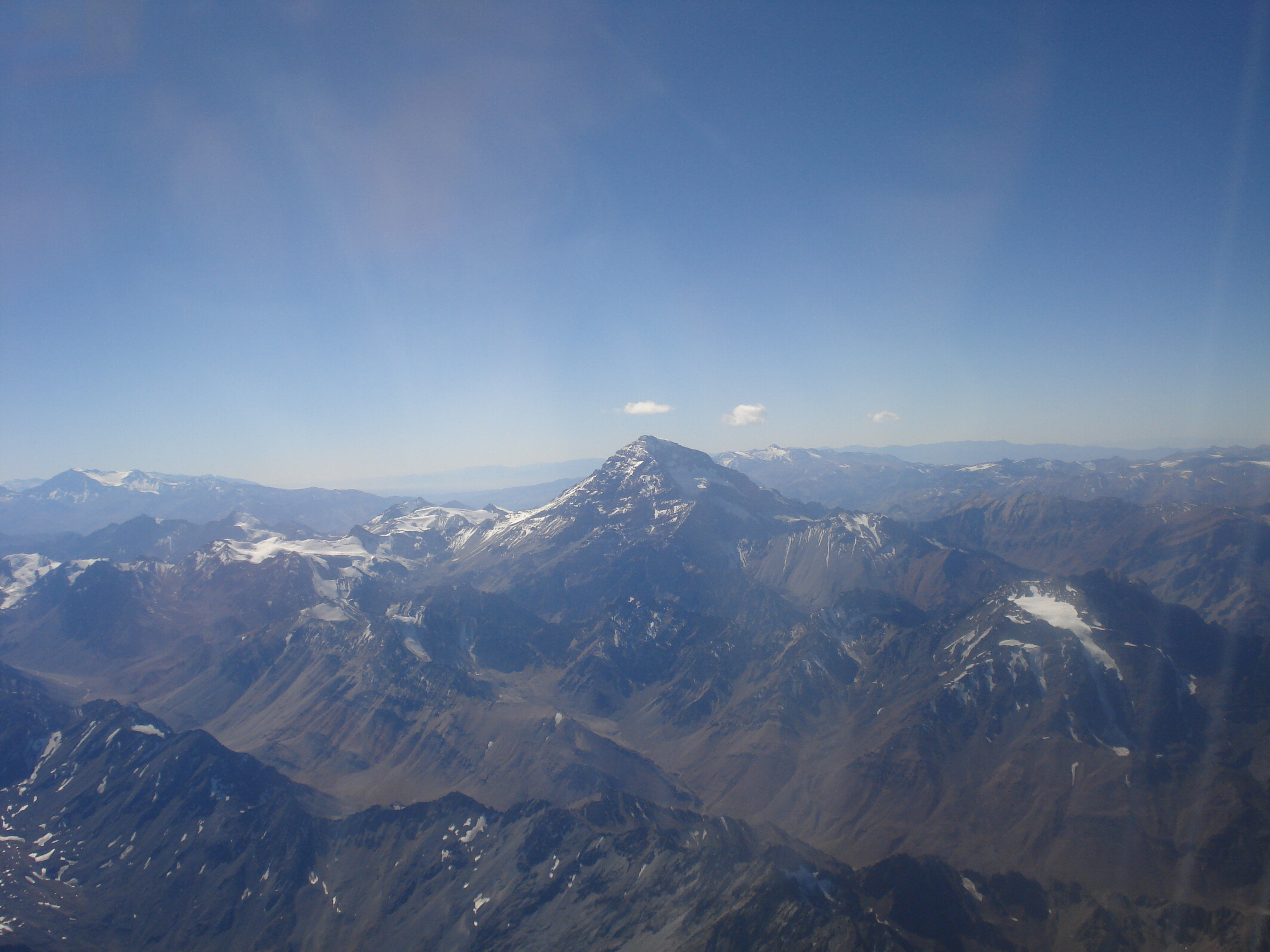 Monte Aconcagua Chile, la maxima altura de sudamerica